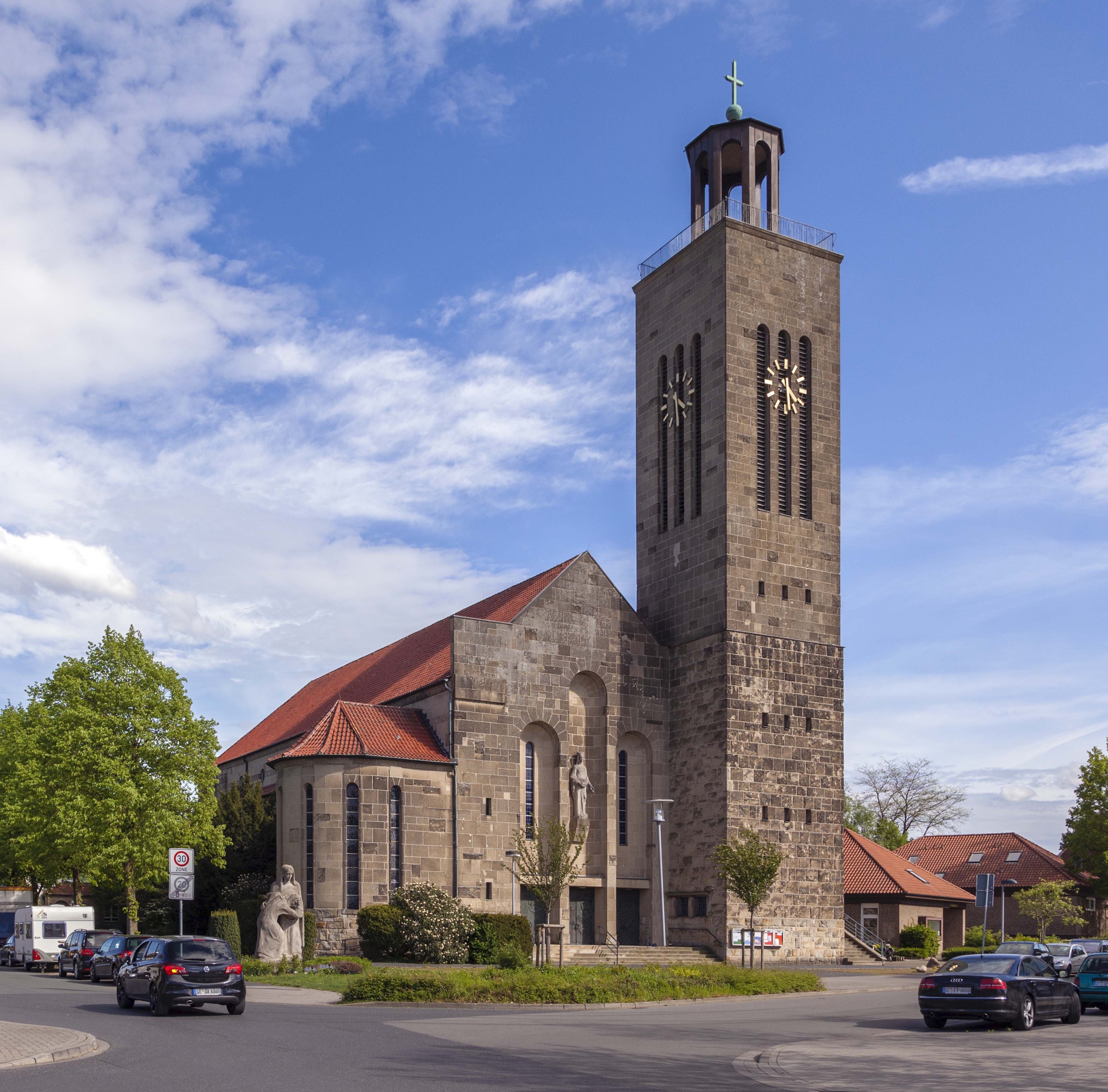 St. Elisabeth Rheine - Westgiebel neu